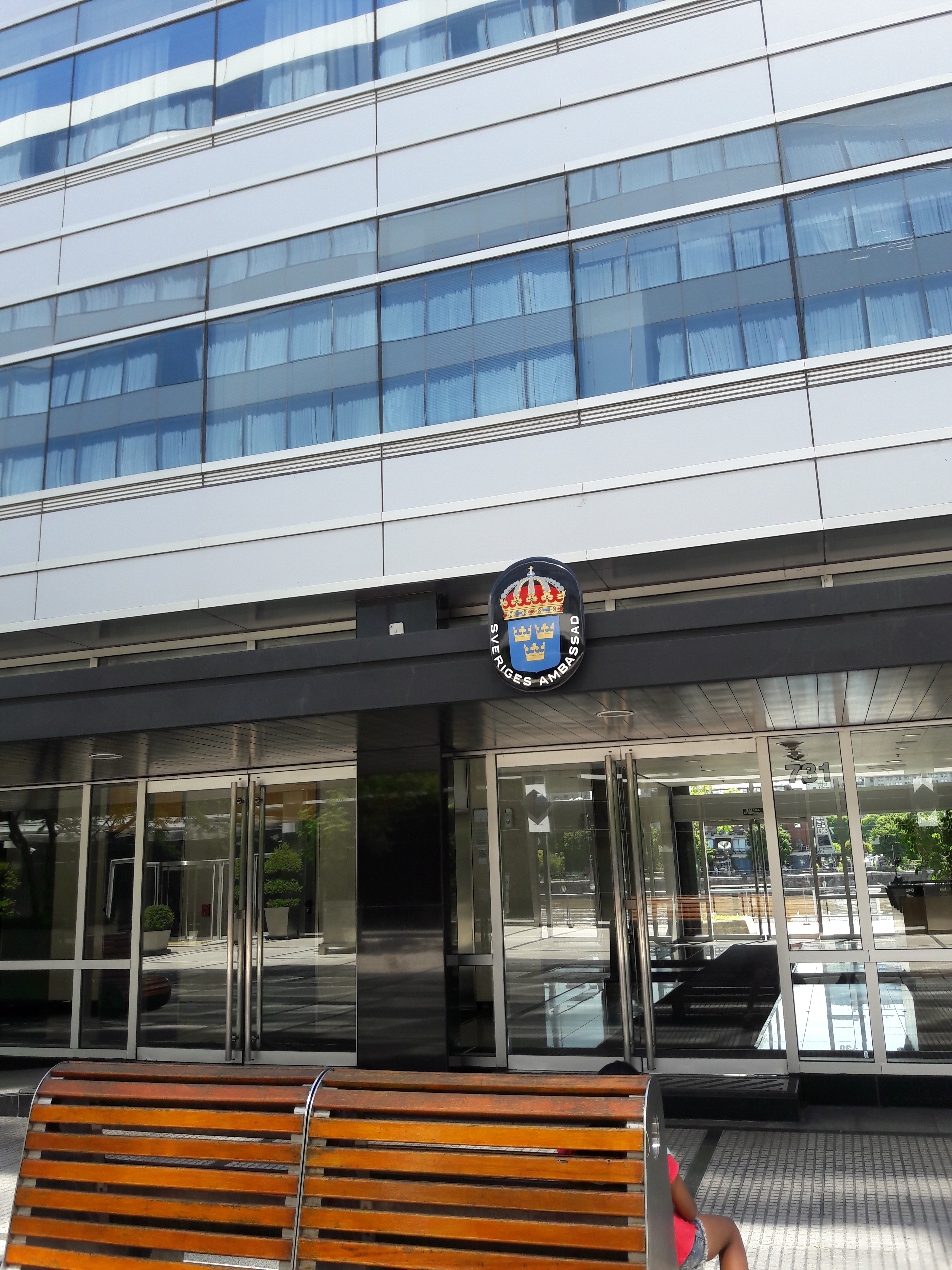 Embajada de Suecia, Puerto Madero, Buenos Aires, Argentina.